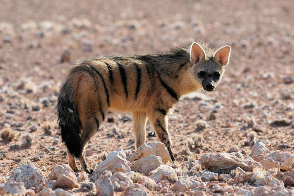 Erdwolf, Namib-Nord, Namibia, 2005